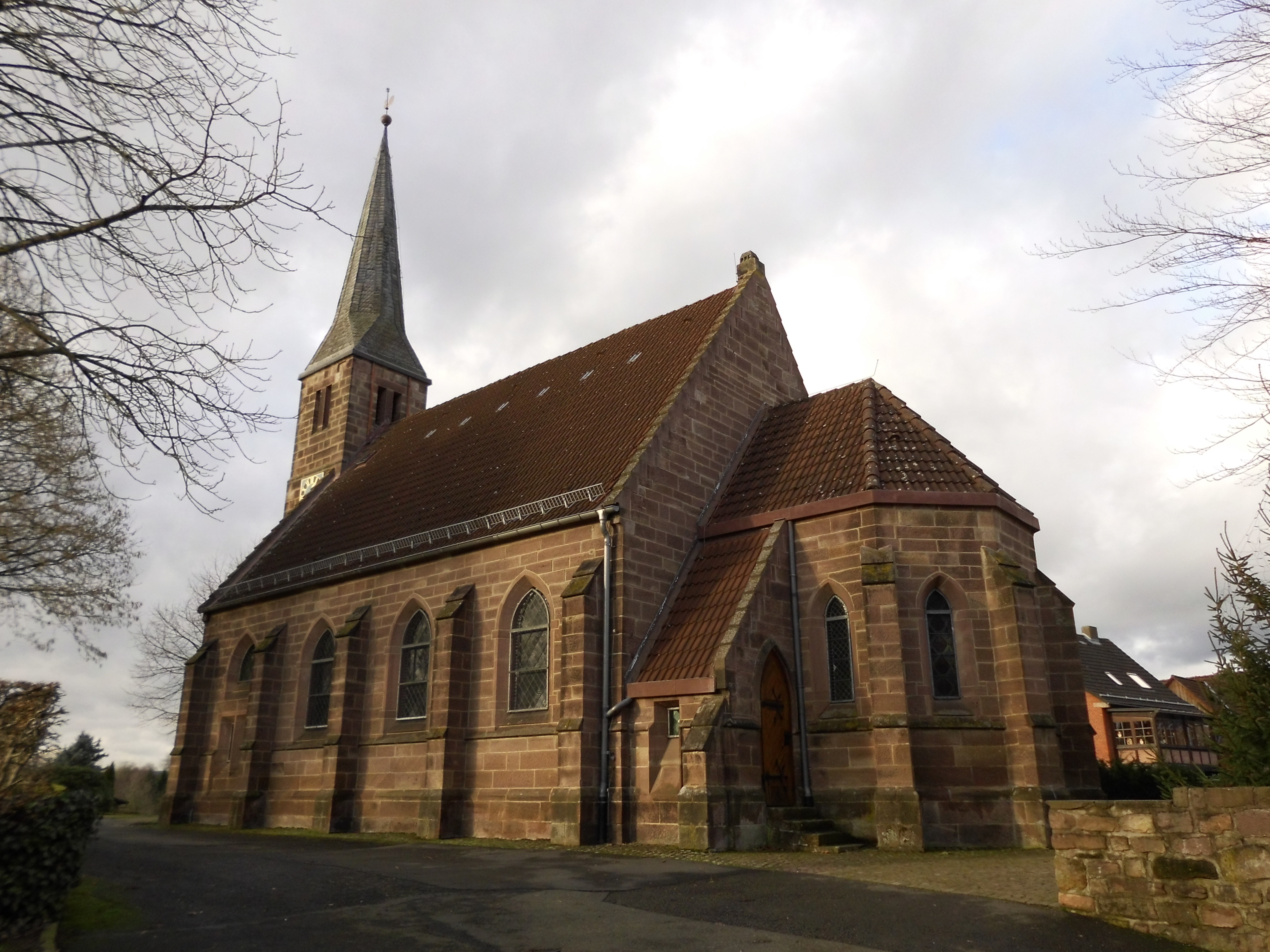 Uslar Ortsteil Bollensen in Niedersachsen. Die Kirche wurde von Conrad Wilhelm Hase erbaut und steht unter Denkmalschutz.